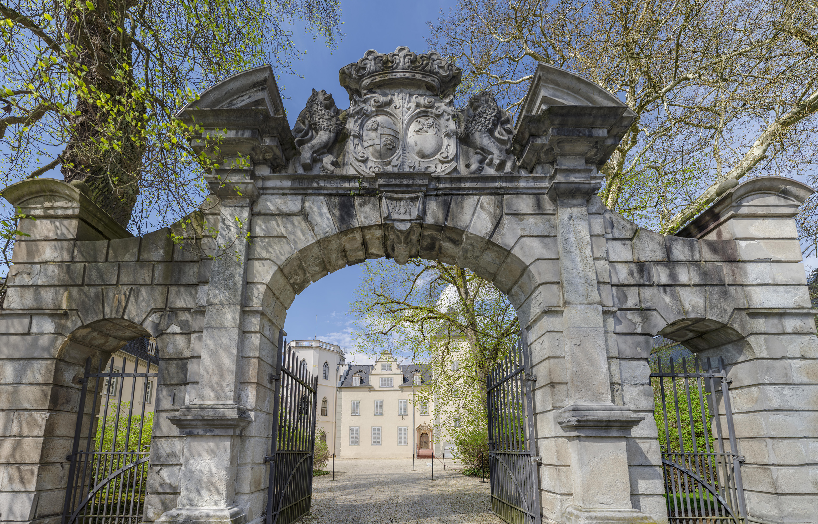 Portal (Eingang) zum Steinschen Schloss in Nassau an der Lahn